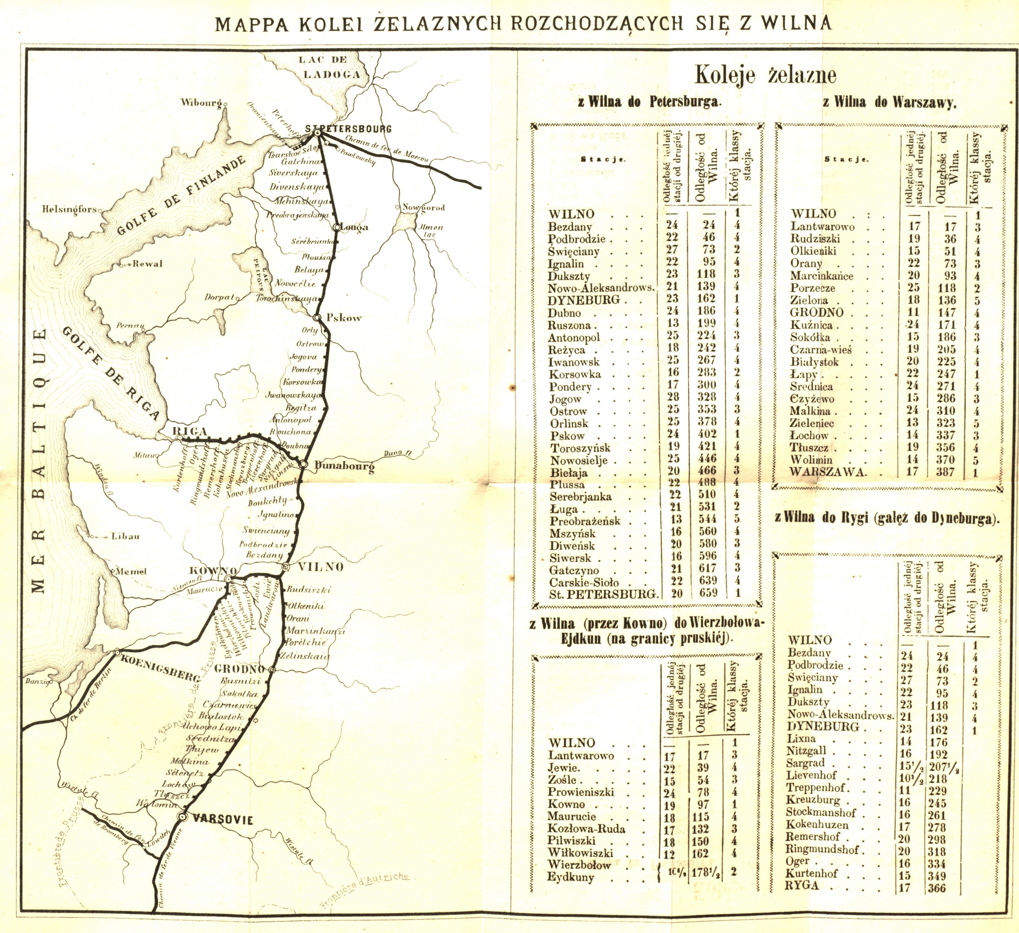 Z planem, widokami Wilna i Mappą kolei żelaznych. s.1.